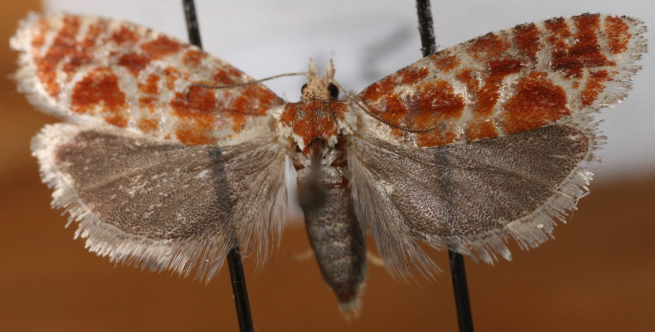 Praktfuruskuddvikler Rhyacionia pinicolana har grå bakvinger.